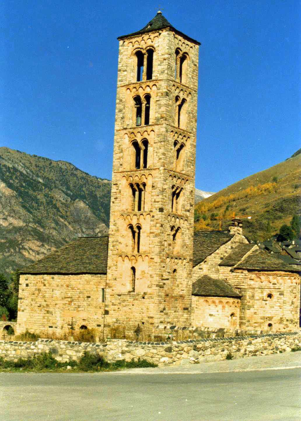 Sant Climent de Taüll, Vall de Bohí. Picture take it by Núria Pueyo